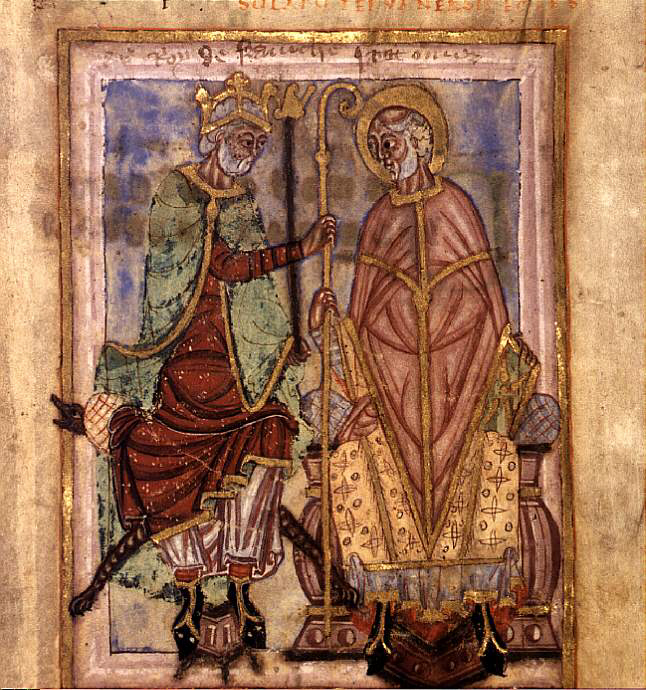 Omer et le Roi Dagobert ; Vie de Saint Omer ; XIe s, Chapitre de la Cathédrale ; Ms 698. Bibliothèque municipale de saint-Omer.